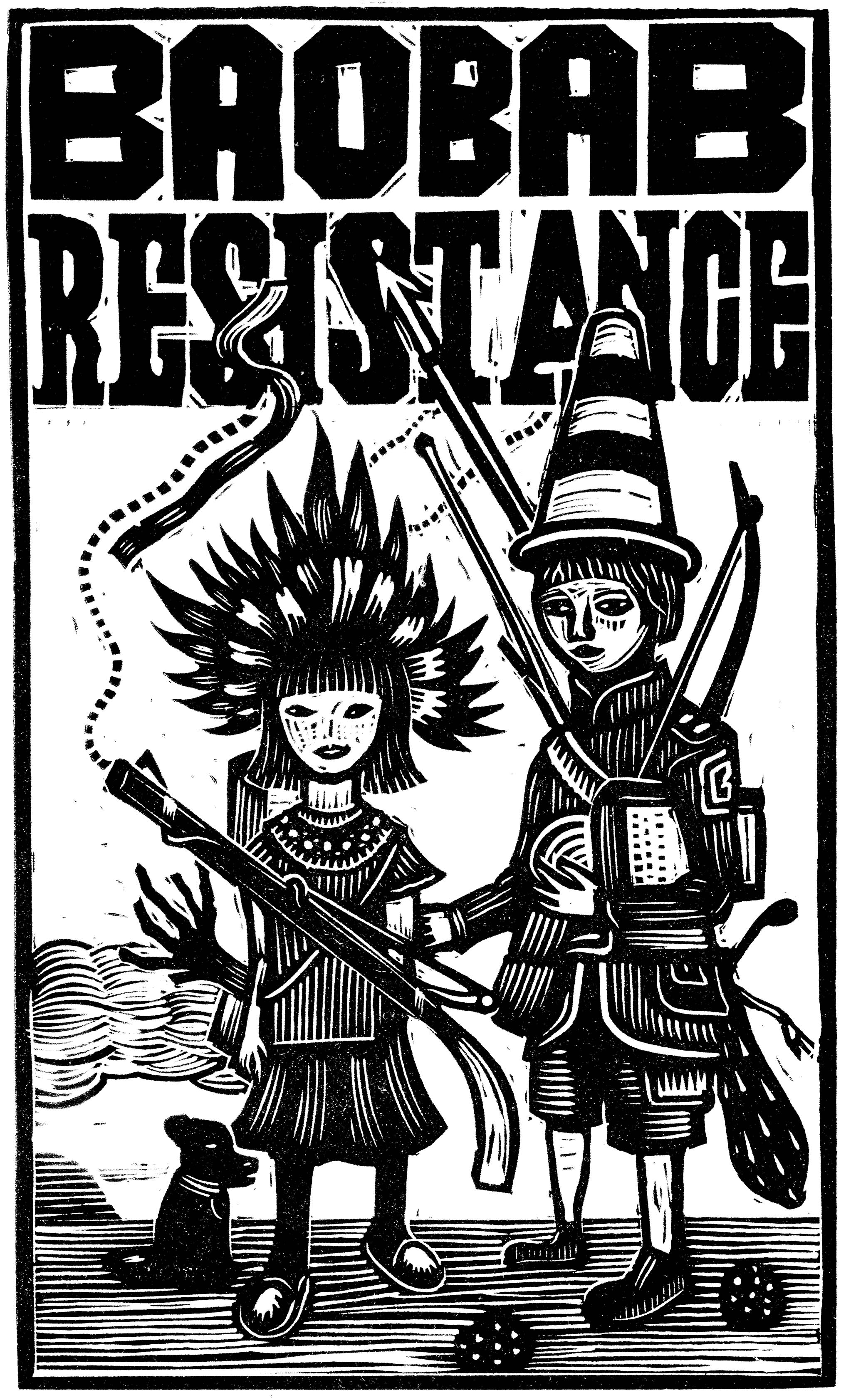 Linoryt